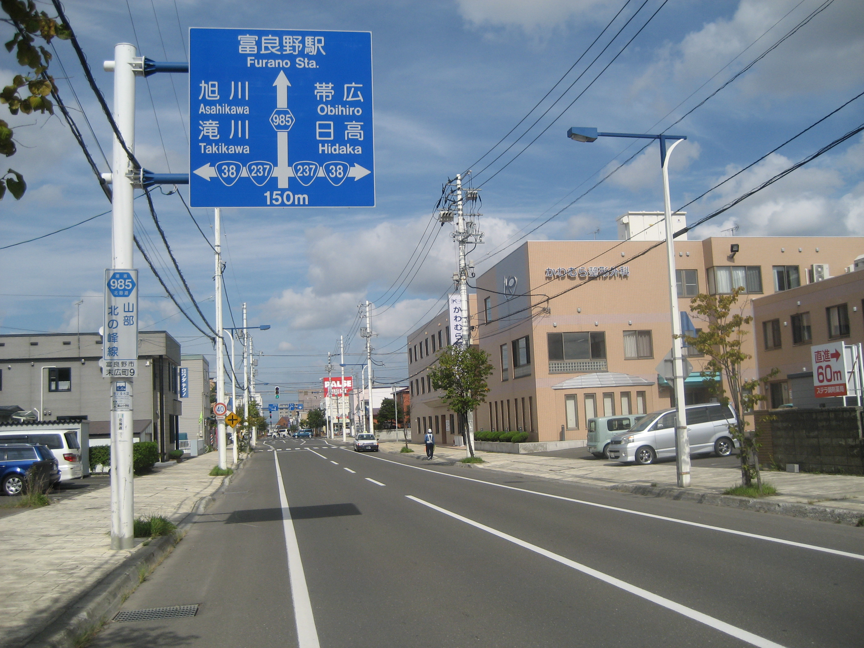 北海道道985号線富良野市末広町９付近（富良野駅方面を撮影）